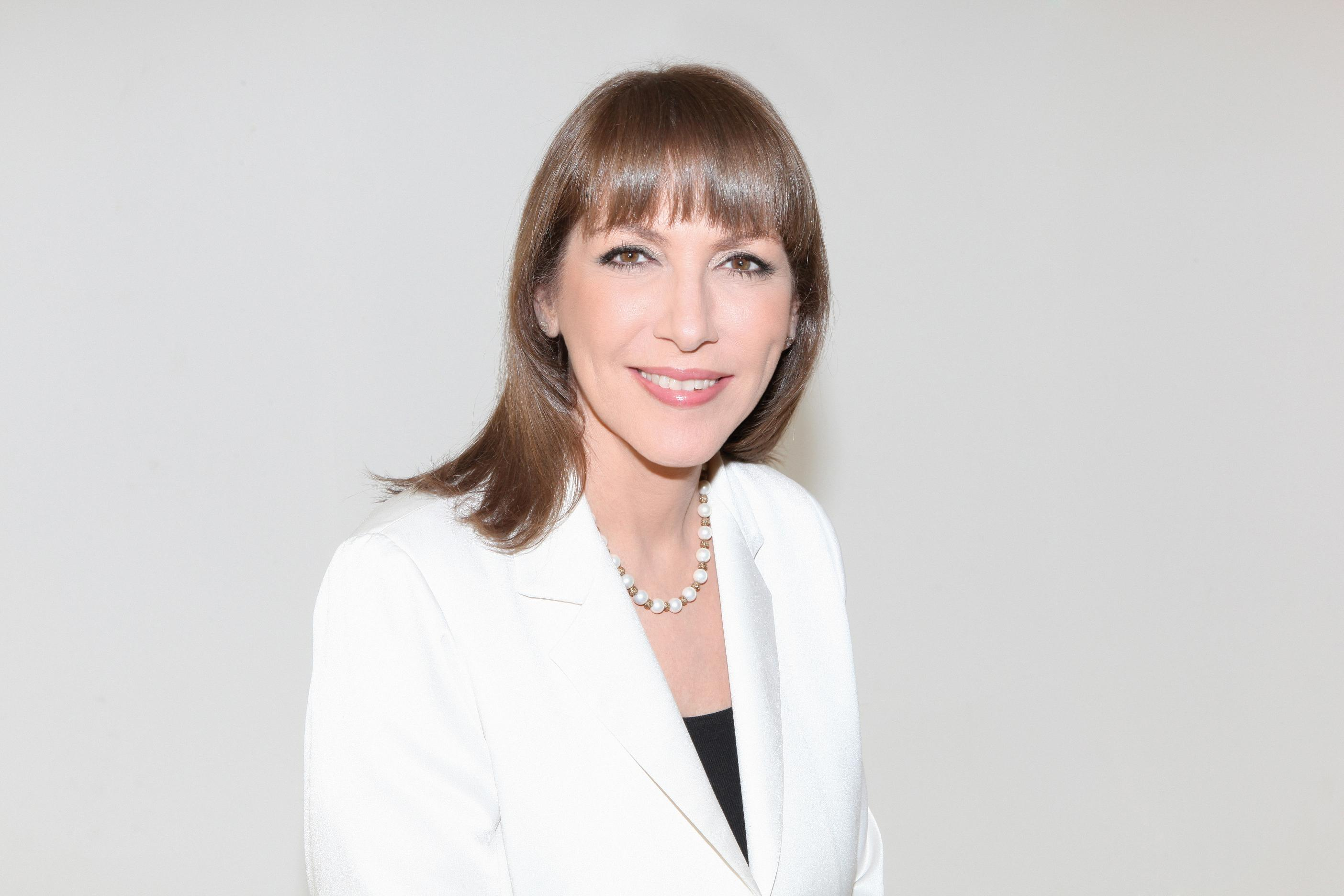 לימור לבנת